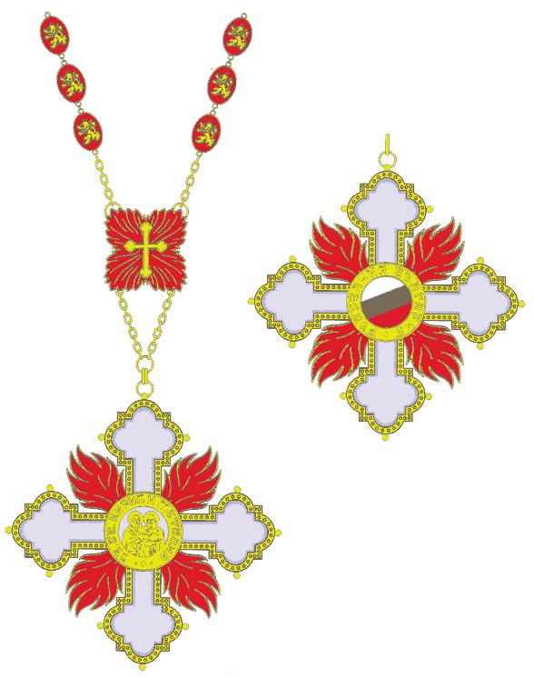 Орден "Стара планина"